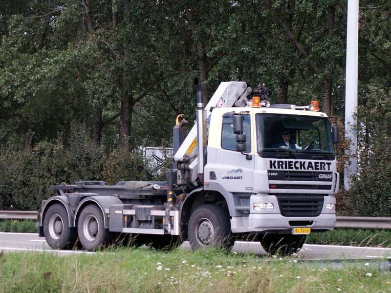 GINAF X3331 trekker. Eigen foto.